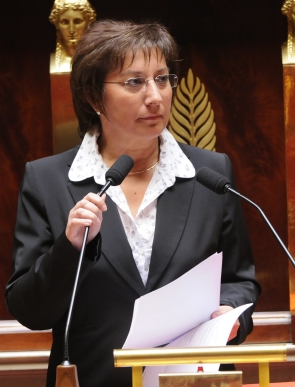 Martine Pinville à l'assemblée Nationale